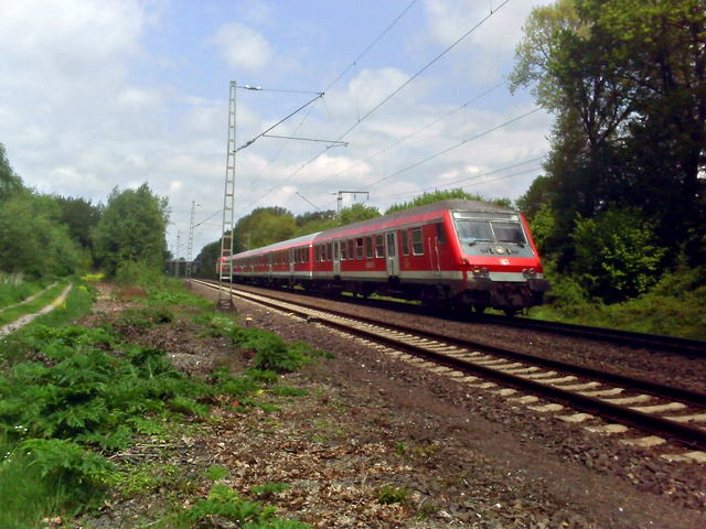 Rotenburg: Zug nach Verden, 19 km from Verden (aller), Deutschland (Zone 32).